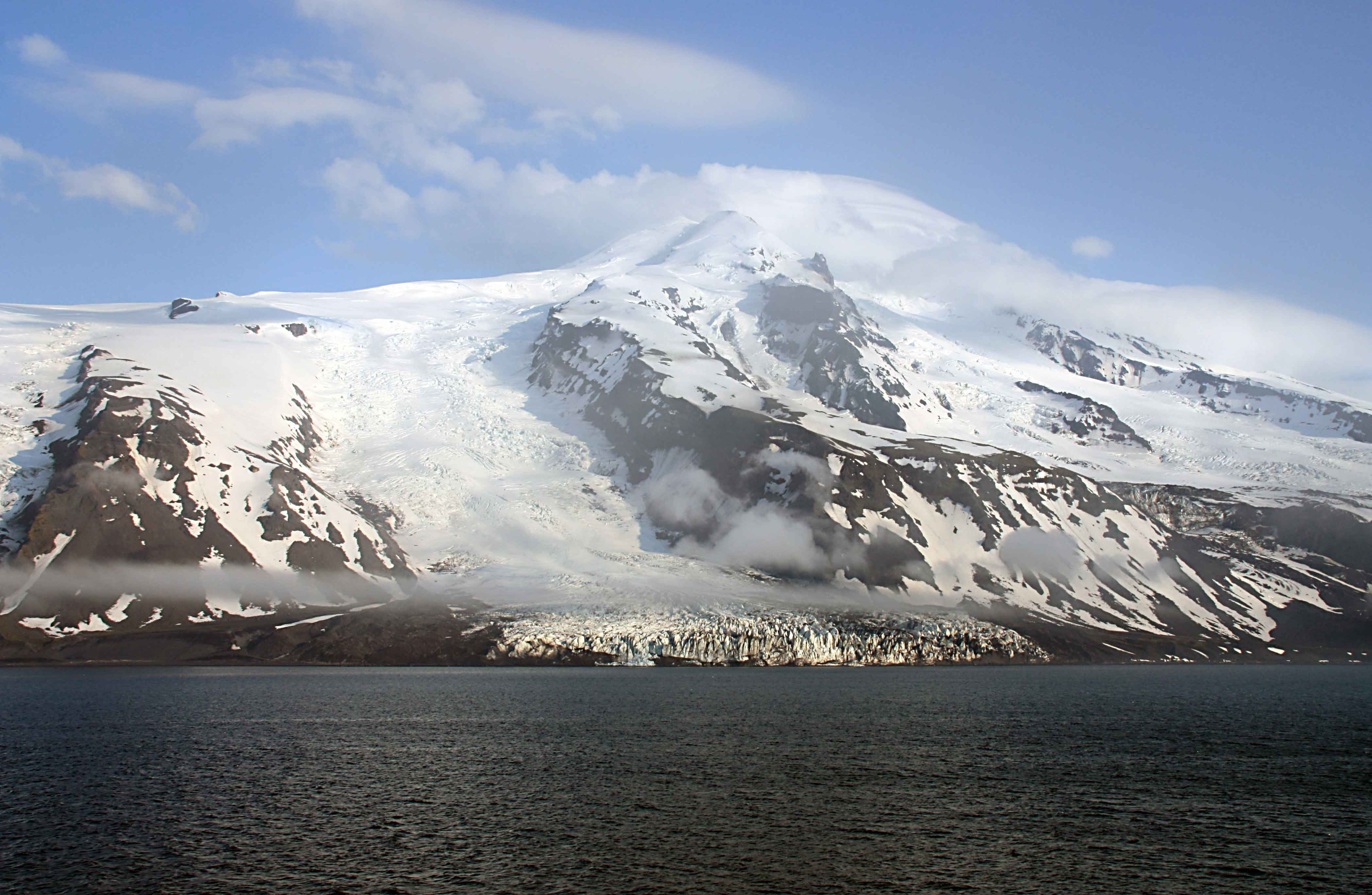 Westküste von Jan Mayen, Gletscher nördlich des Beerenbergs, während eines aufreißenden Nebels. Anmerkung: In der Mehrzahl der Fälle haben Kreuzfahrten zwischen Island und Spitzbergen keine Landsicht.